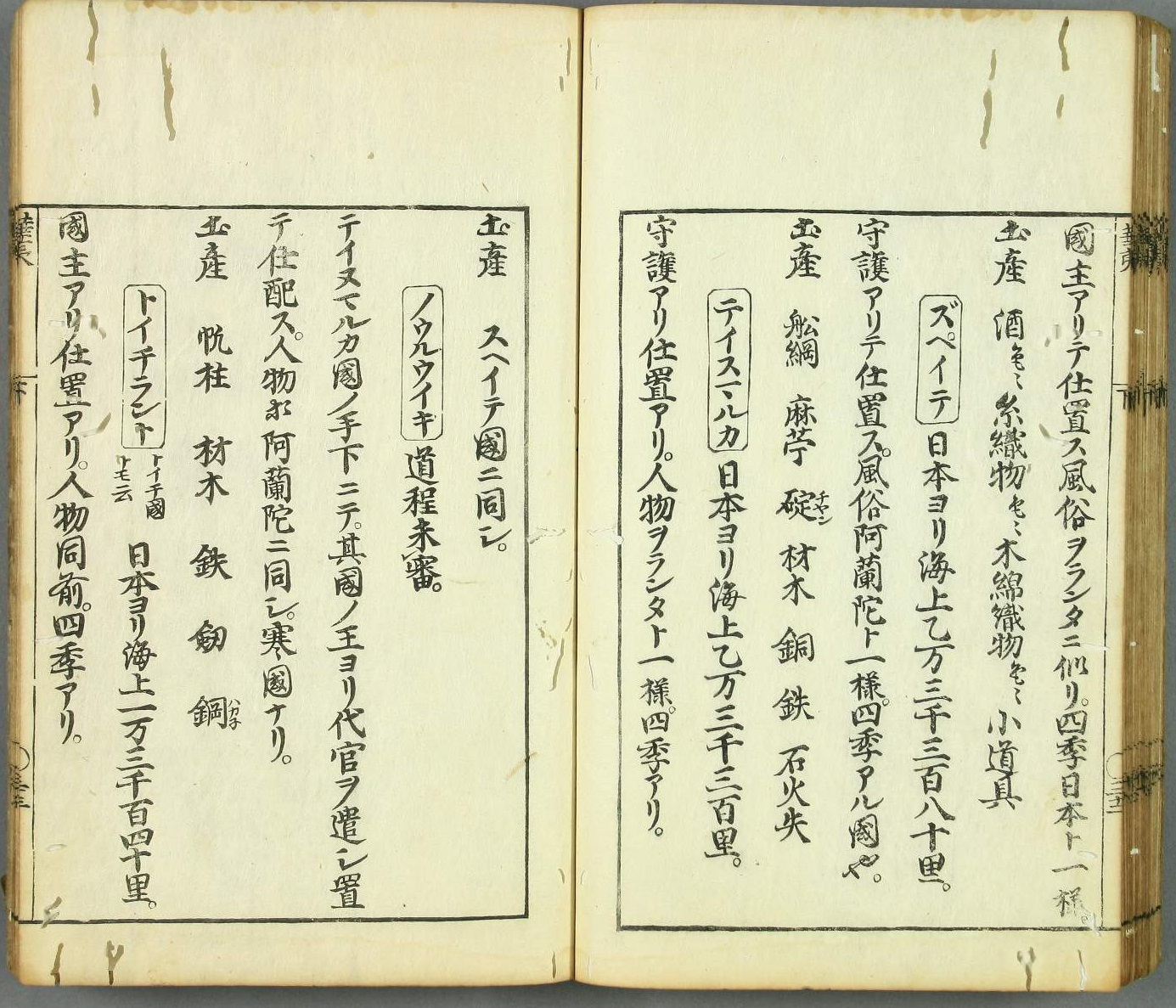 西川如見『増補華夷通商考』(1708）